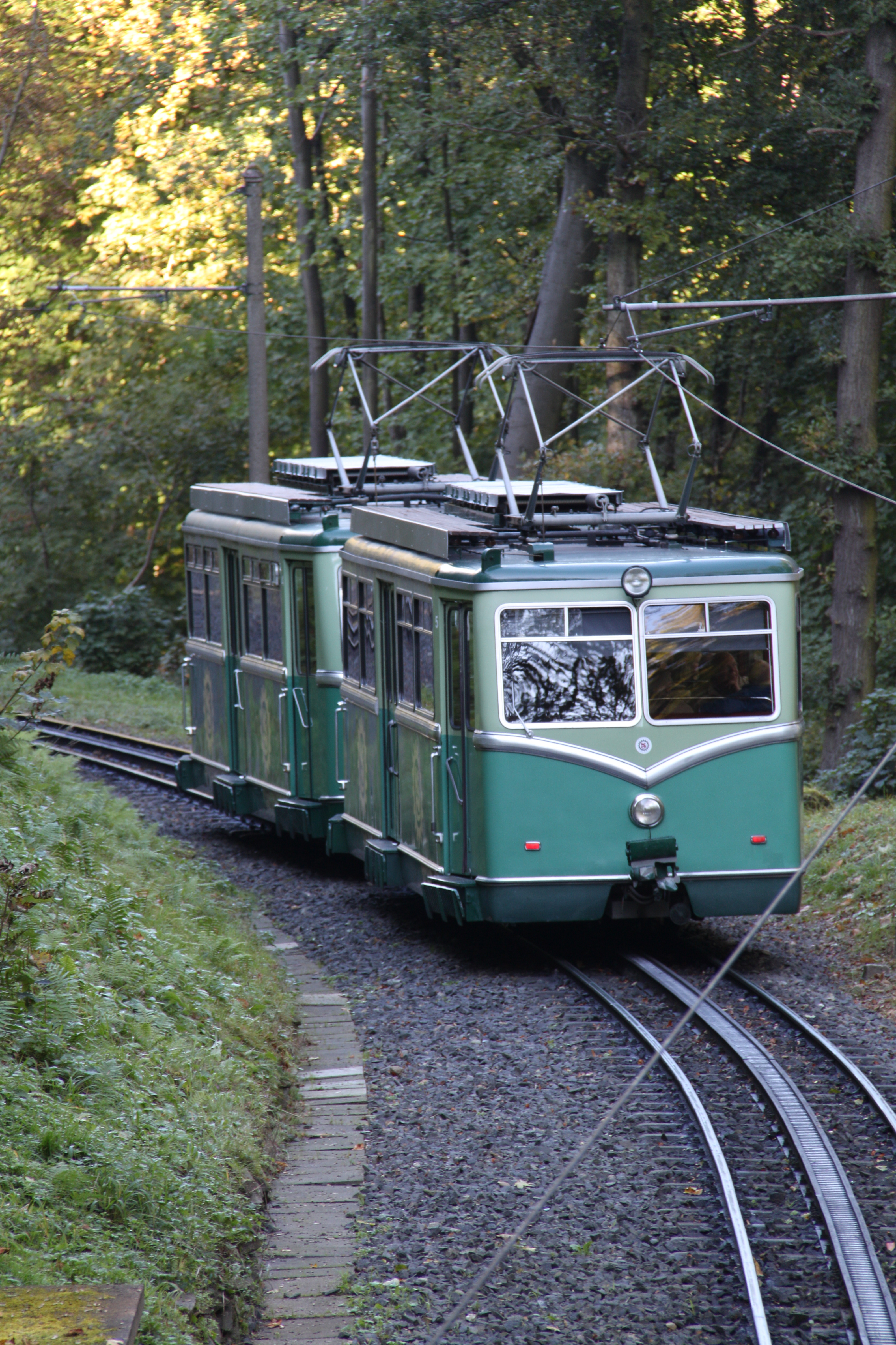 Drachenfelsbahn Triebwagen 5 und 2 (talwärts fahrend)